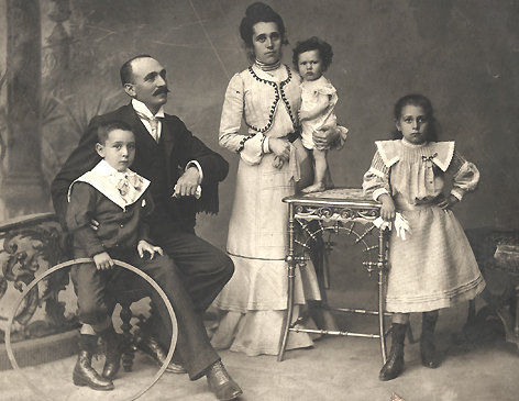 Emilio Fagnani com seus filhos (da esq. para a dir.) Durval, Carmen e Filomena, e sua esposa Maria Luiza